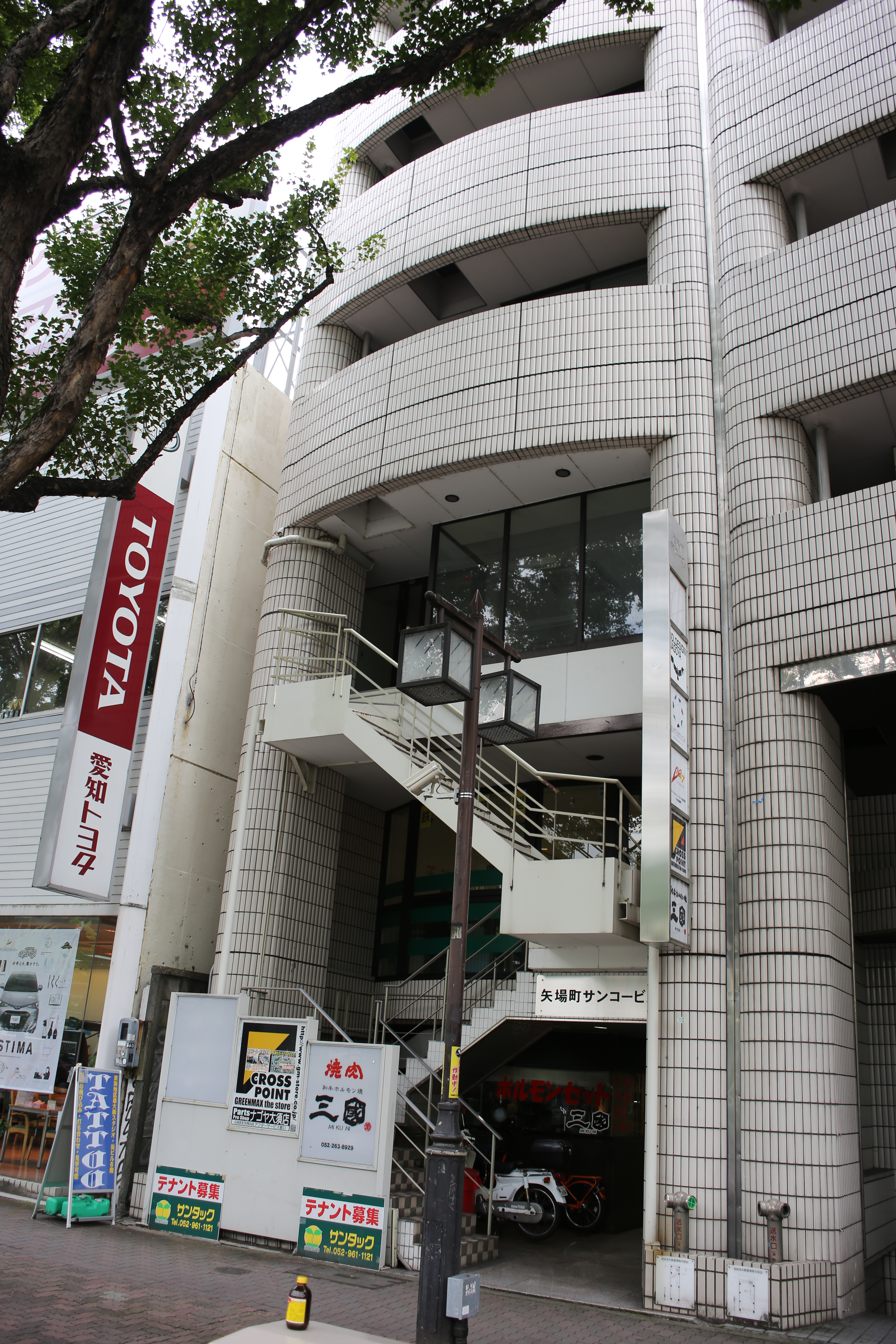 名古屋市中区大須三丁目の矢場町サンコービルを北側公道西側より撮影